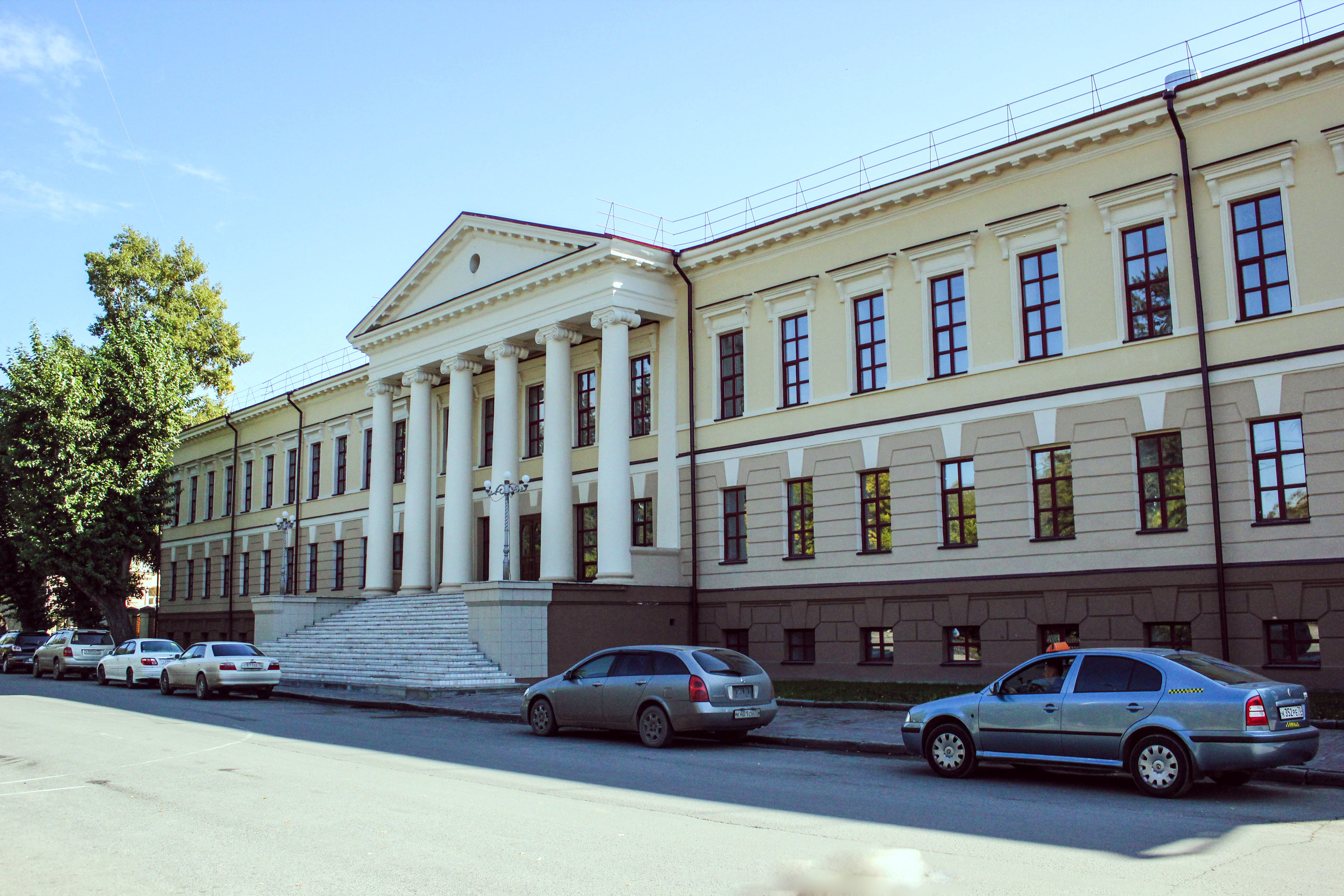 Здание бывшего губернского правления (присутственные места), Томск.